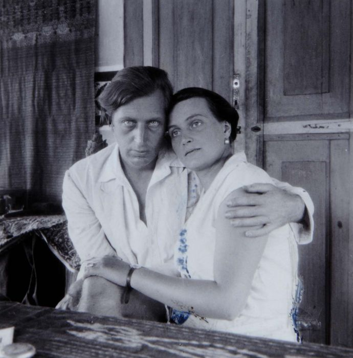 Foto. Walter Spies en Angelica Archipenko (alias Gela Forster) poseren voor de camera van Rudolf Bonnet